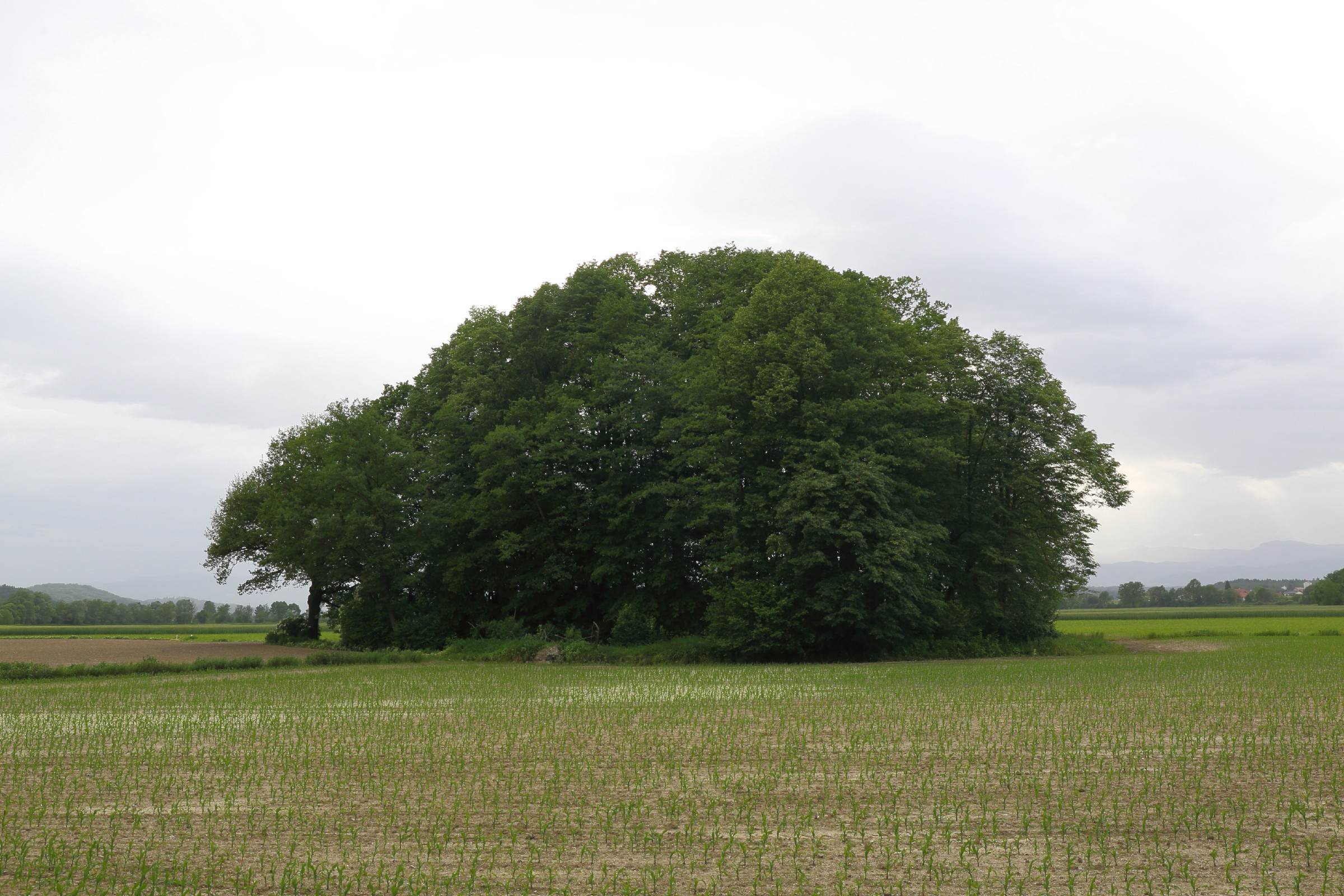 Burstall von Kelzenwert, umgeben von einem alten Wassergraben This media shows the Geschützter Landschaftsteil in Styria with the ID GLT_0235.